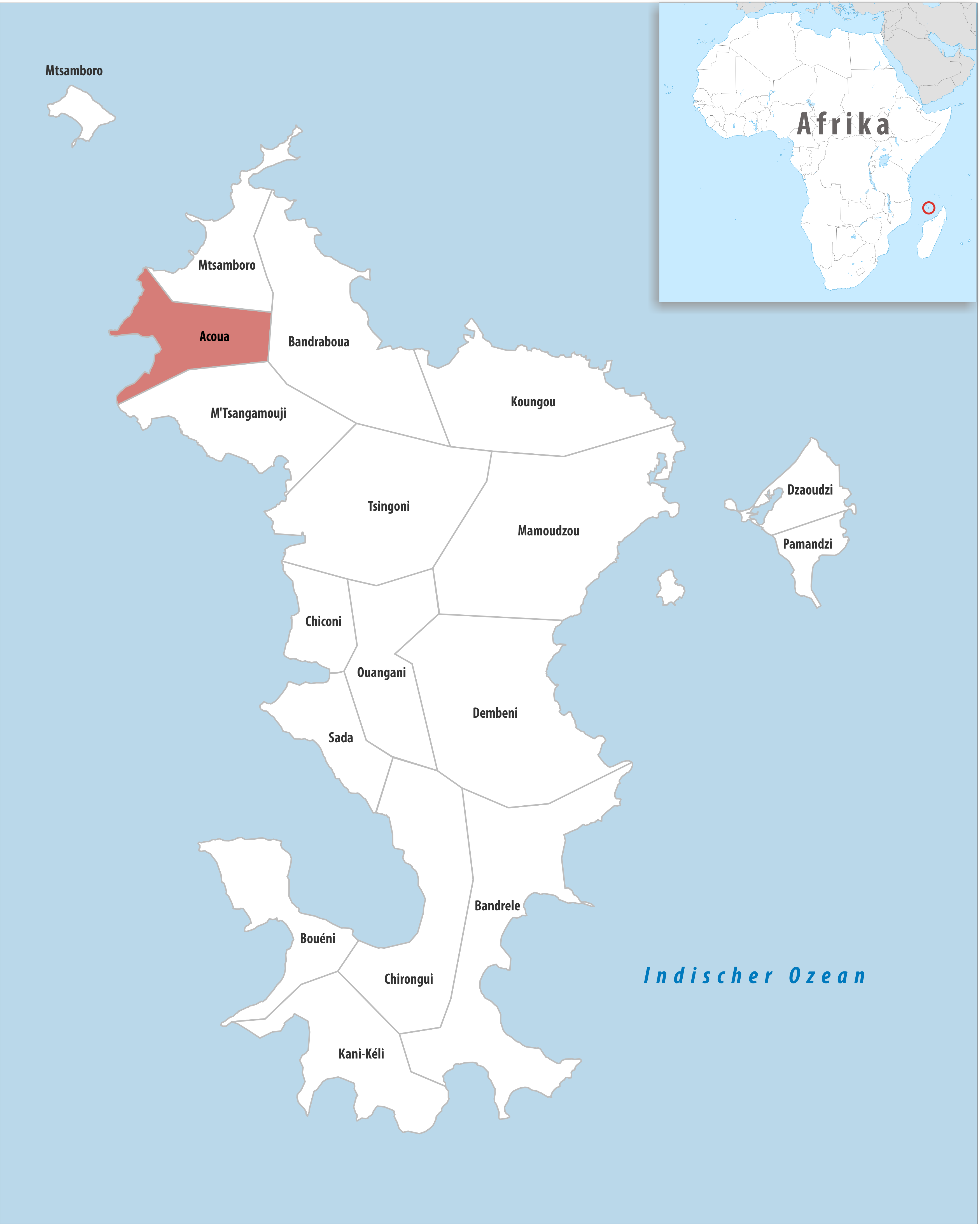 Lage der Gemeinde Acoua